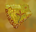 Detall Tapís de la Creació.Eva. Segle XI-XII